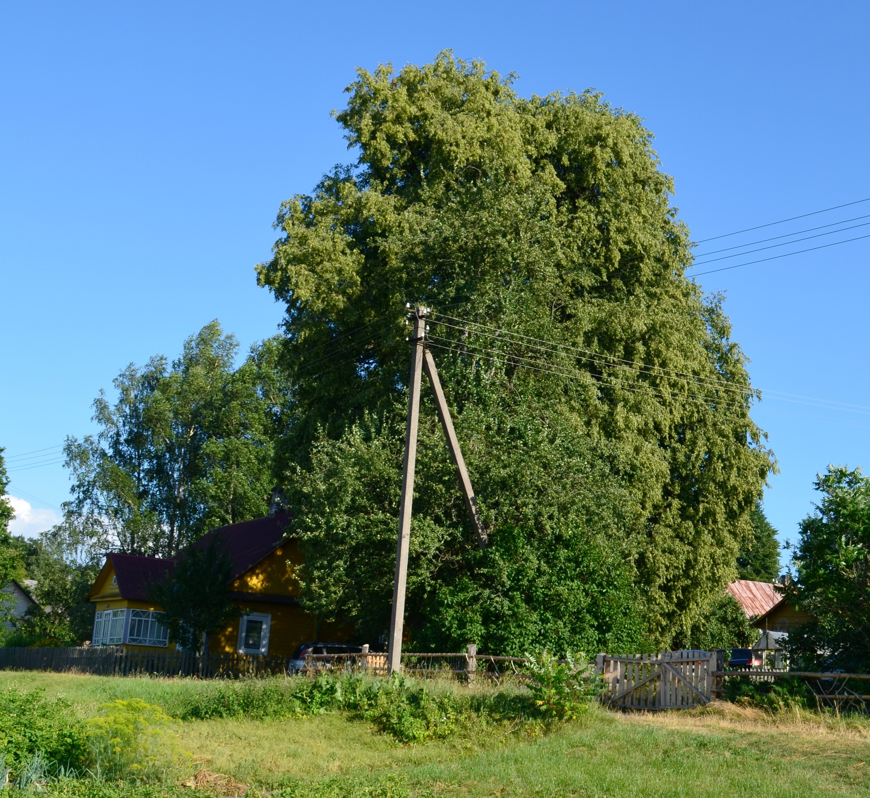 Lietuvio liepa, Margionys, Varėnos r.